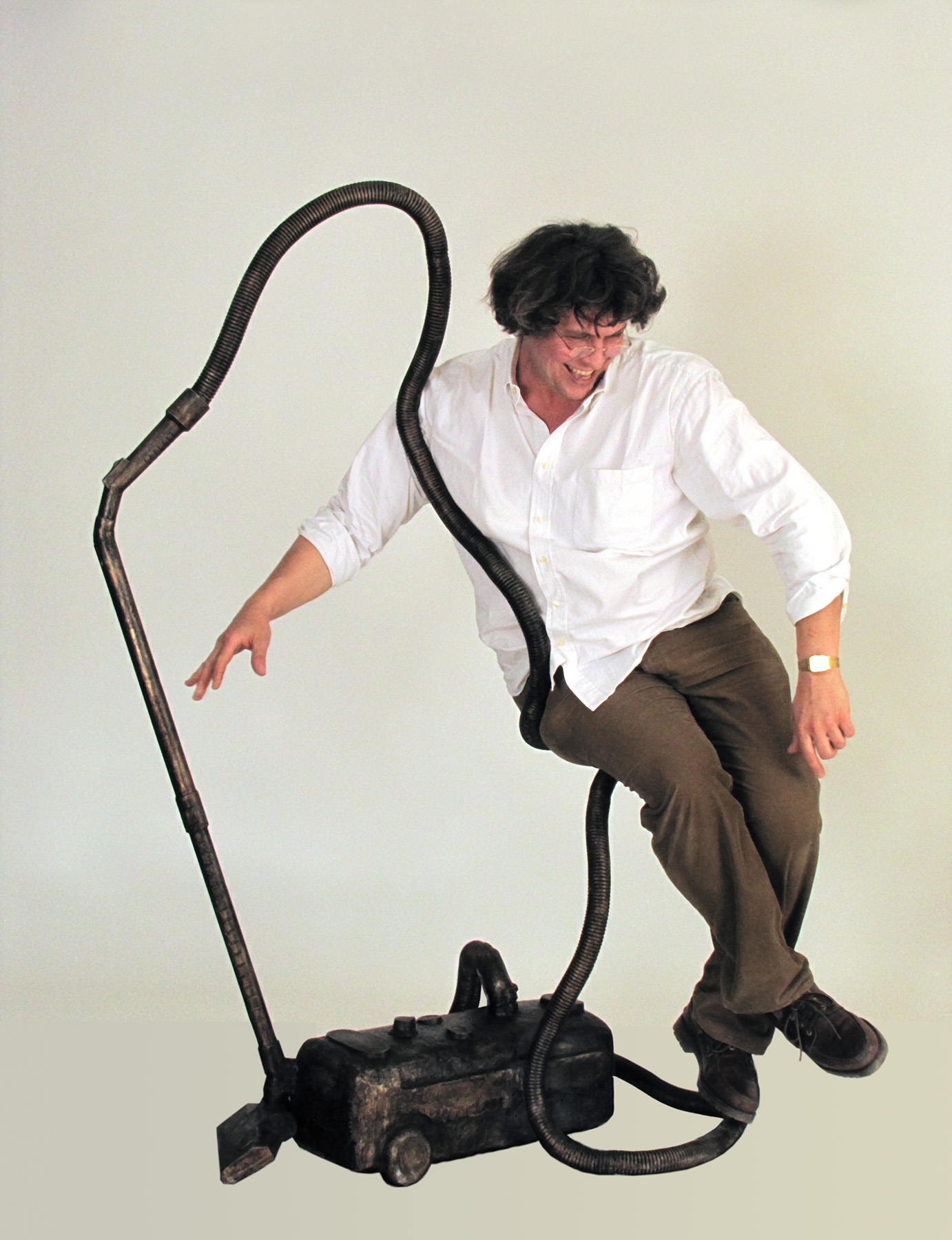 Durante mucho tiempo la aspiradora fue símbolo de las tareas caseras. Este instrumento presente en todos los hogares se transforma hoy por la gracia del artista en un objeto artístico de descanso : La Silla-Aspiradora de bronce sobre la cual Frédéric Berthelot nos da la oportunidad de sentarnos. La Aspiradora es un objeto que tiene para todos un significado, que está al alcance de todo el mundo y es útil para todos. No obstante, no todos poseen en casa una aspiradora de bronce sobre la cual cada uno podría fácilmente sentarse en vez de utilizarla; Una obra atípica, cuya primera función ha sido desviada por el artista. Berthelot devolvió todos sus méritos a este objeto que solíamos disimular. En la historia de los progresos sociales, fue el objeto predilecto de la liberación de la mujer tal como lo presentaban las publicidades de la segunda mitad del siglo veinte. Ahora gracias a Berthelot la aspiradora cobra un nuevo valor pues está en la gloria y puede por fin tener un lugar preferente en medio del salón sin recelo a la vista de todos.